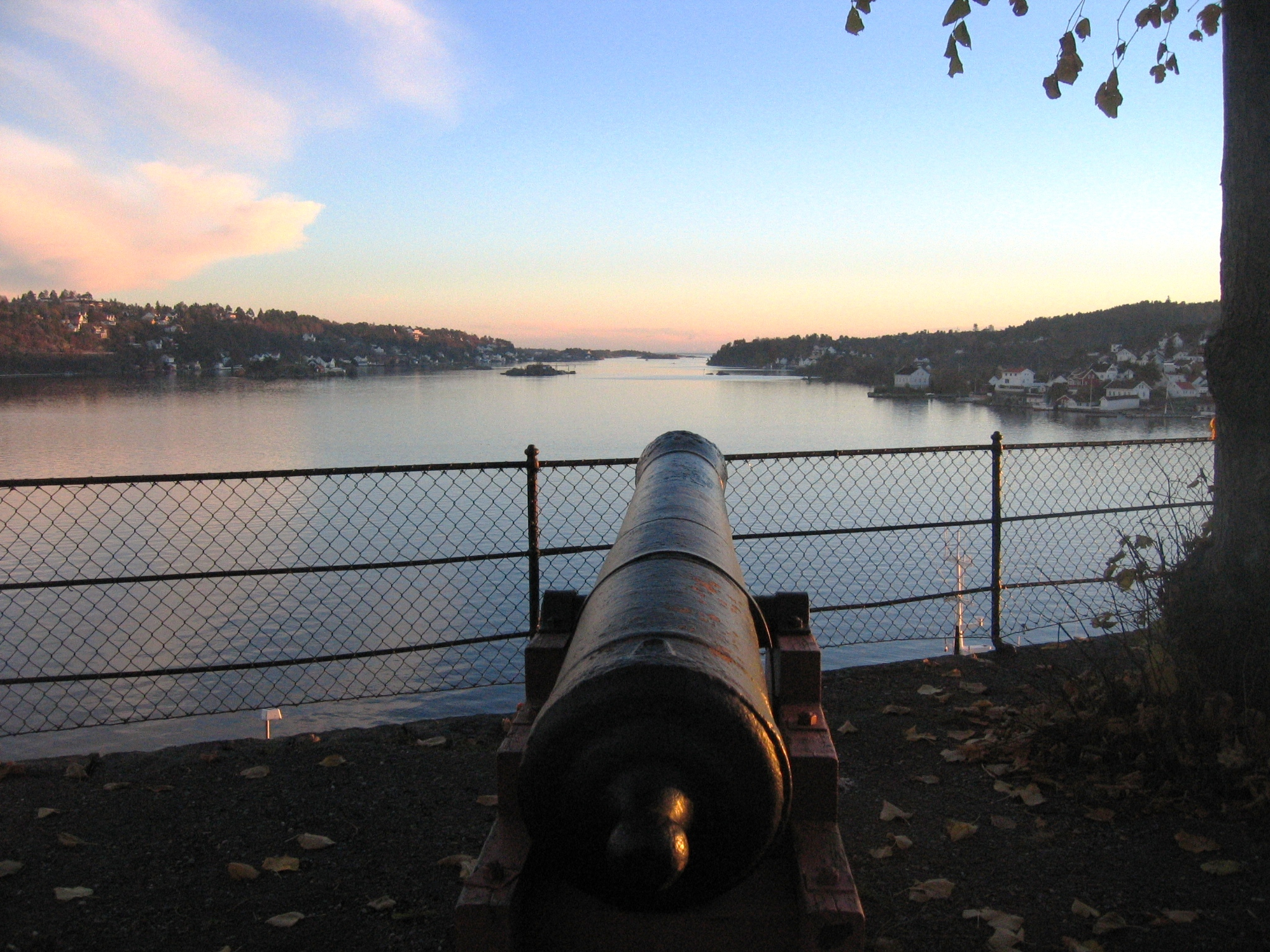 Batteriet i Arendal, Galtesund